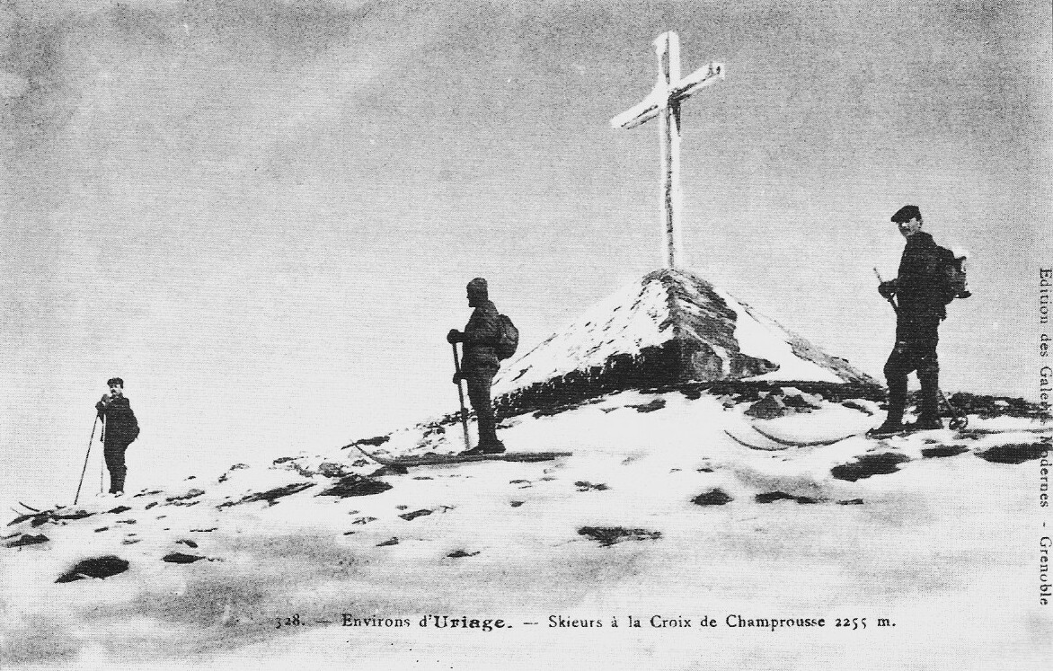 Début du ski à Chamrousse (Champrousse sur la carte) 2255 m. (Isère) vers 1900.